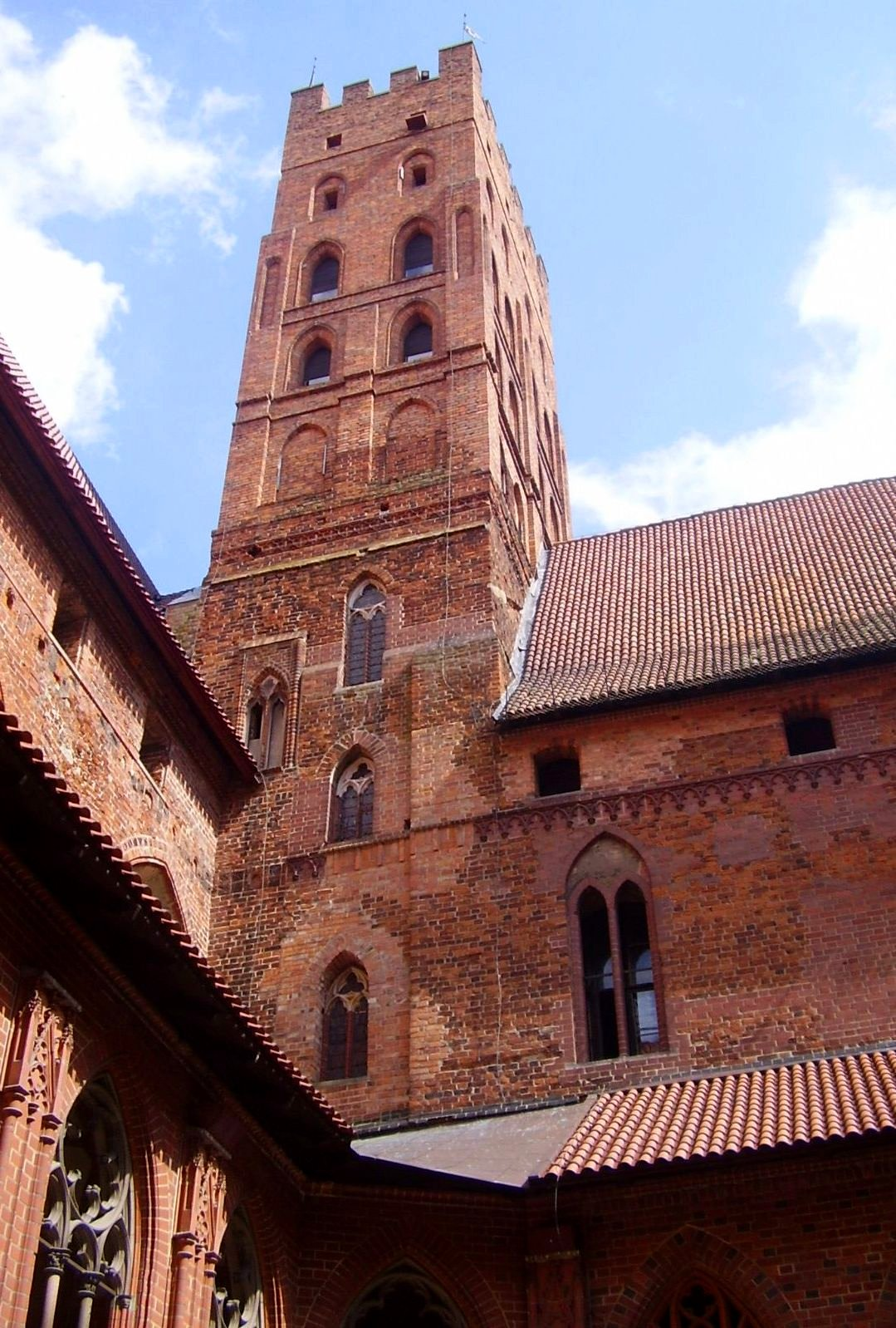 Wieża główna w Zamku w Malborku